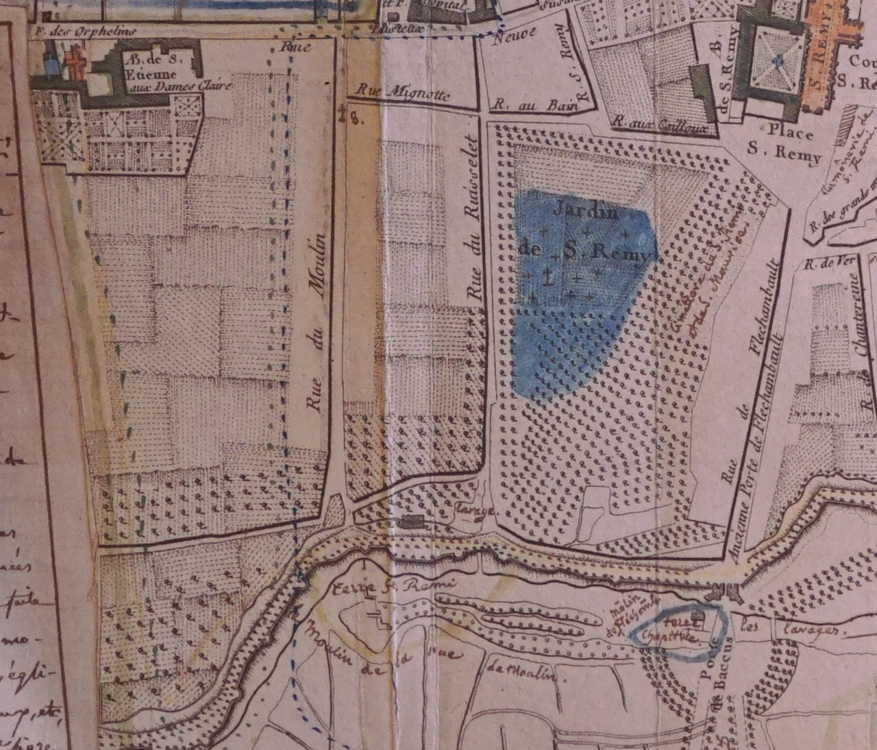 extrait du manuscrit ms 1878.